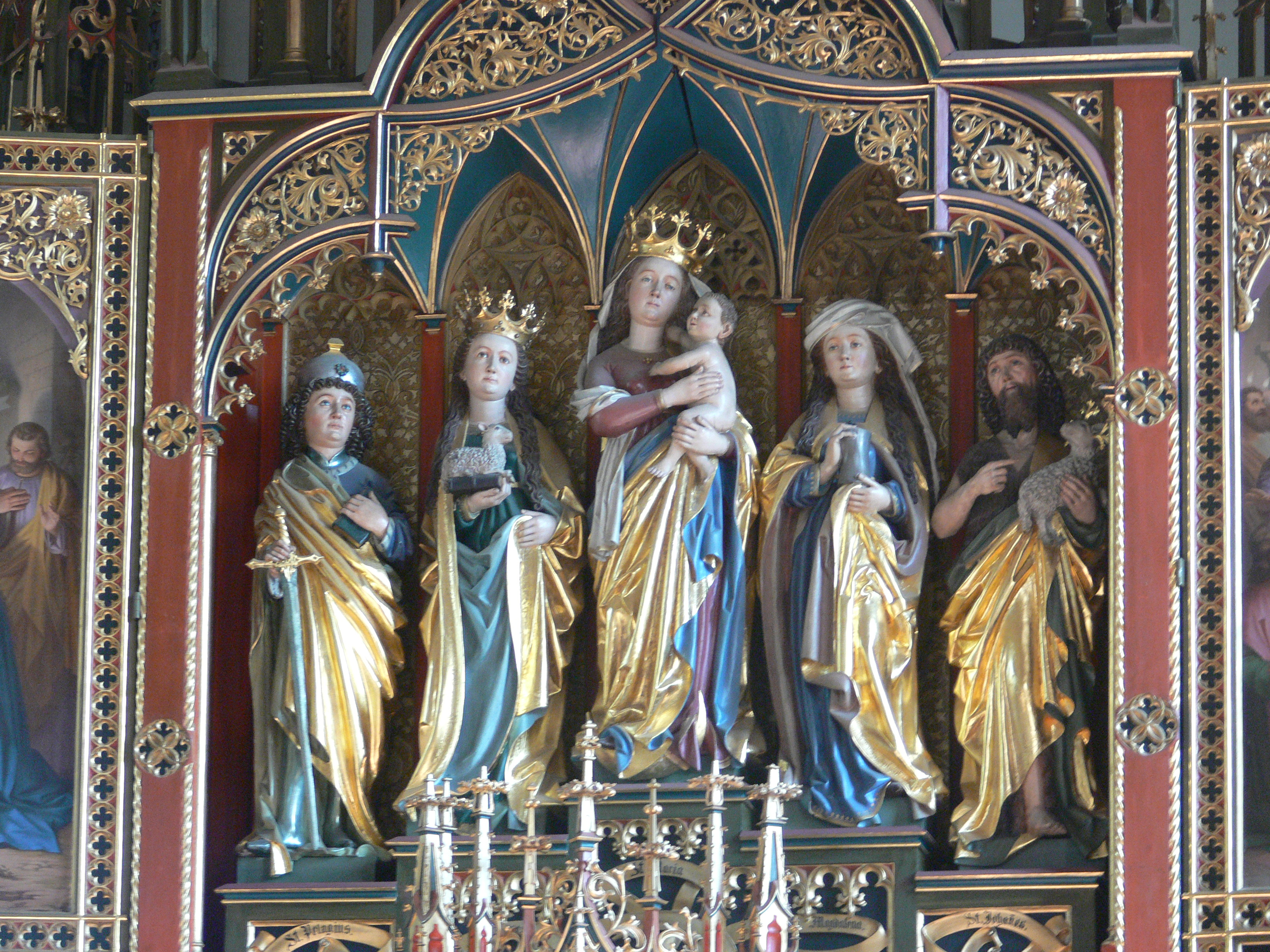 von links nach rechts: St. Pelagius, St. Agnes, Mondsichel-Madonna, Maria Magdalena, Johannes der Täufer Spätgotische Figuren der Ulmer Schule, Schüler von Multscher, um 1471 Schreinfiguren des Hochaltars (neugotisch; von Peter Paul Metz) der Pfarrkirche St. Pelagius, Weitnau